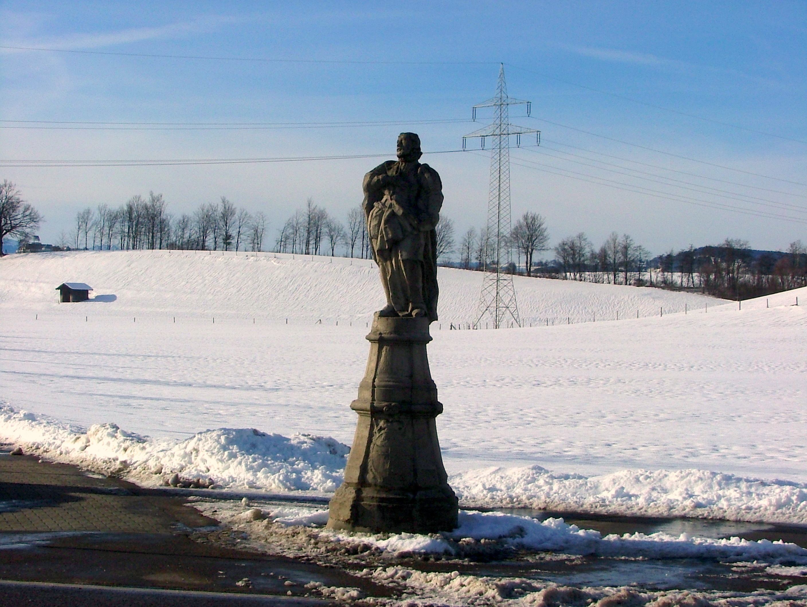 Statue des Hl.Ferdinand bei Leubas